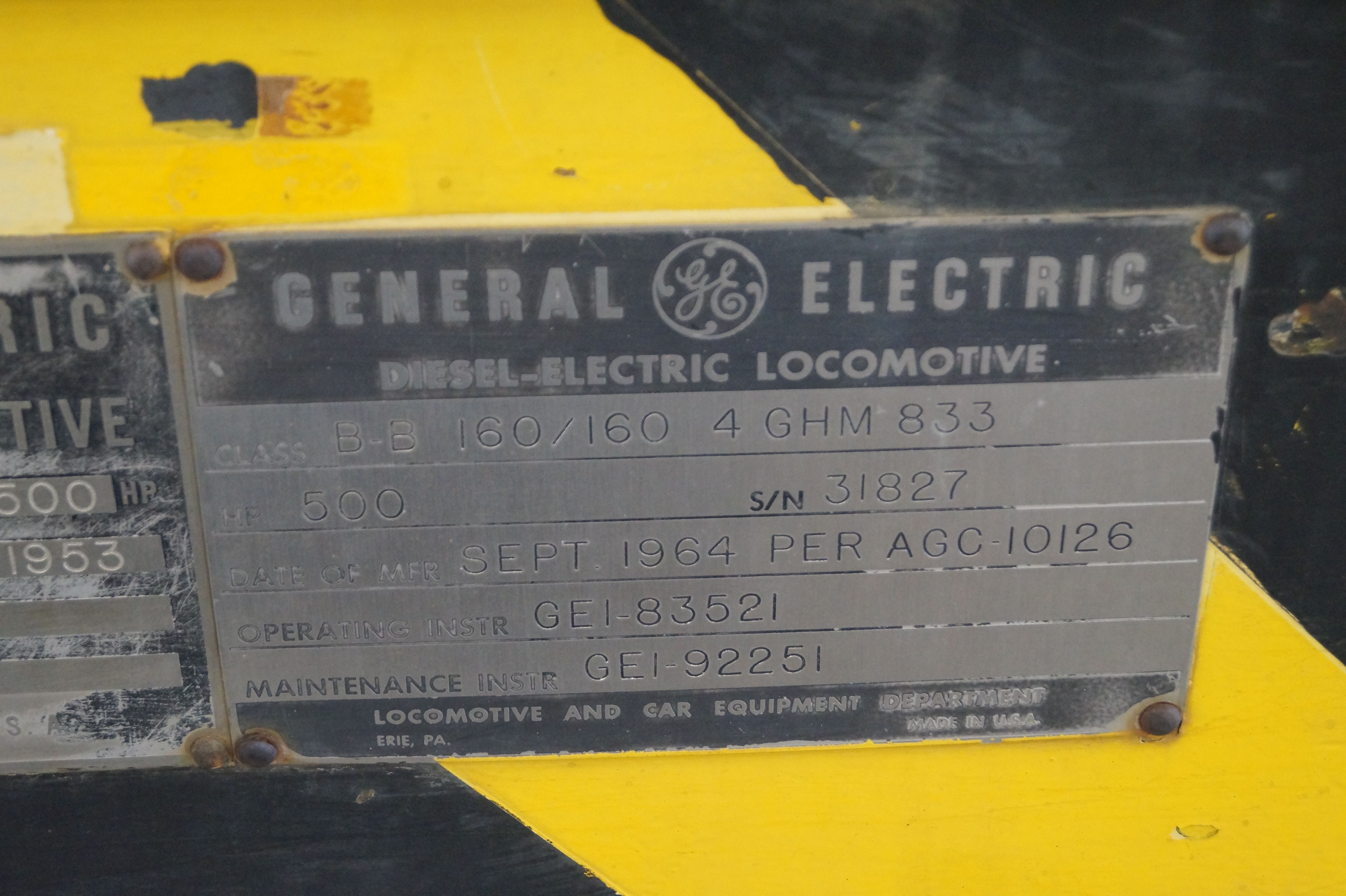 The Nevada State Railroad Museum which is an agency of the Nevada Department of Cultural Affairs. It is located at Yucca Street on the tracks of the historic Union Pacific Railroad branch Henderson-Boulder City near the former Boulder City Railroad Yards where the Hoover Dam construction equipment was unloaded in the 1930s.